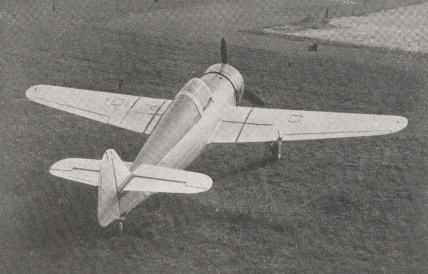 Aspect du monoplace de chasse Koolhoven F.K.58, à moteur HISPANO-SUIZA 14AA10 de 1080ch